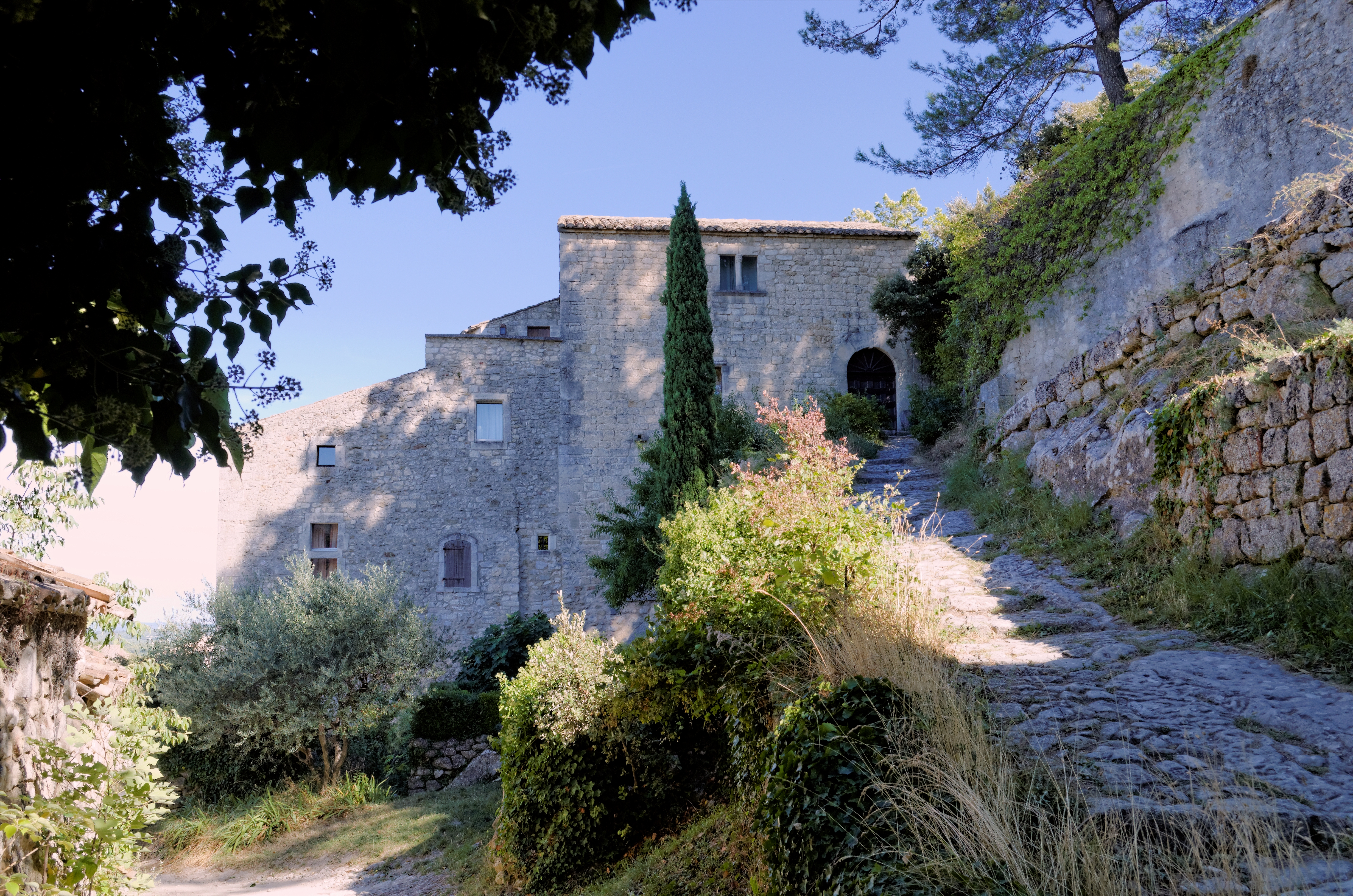 Oppède le Vieux